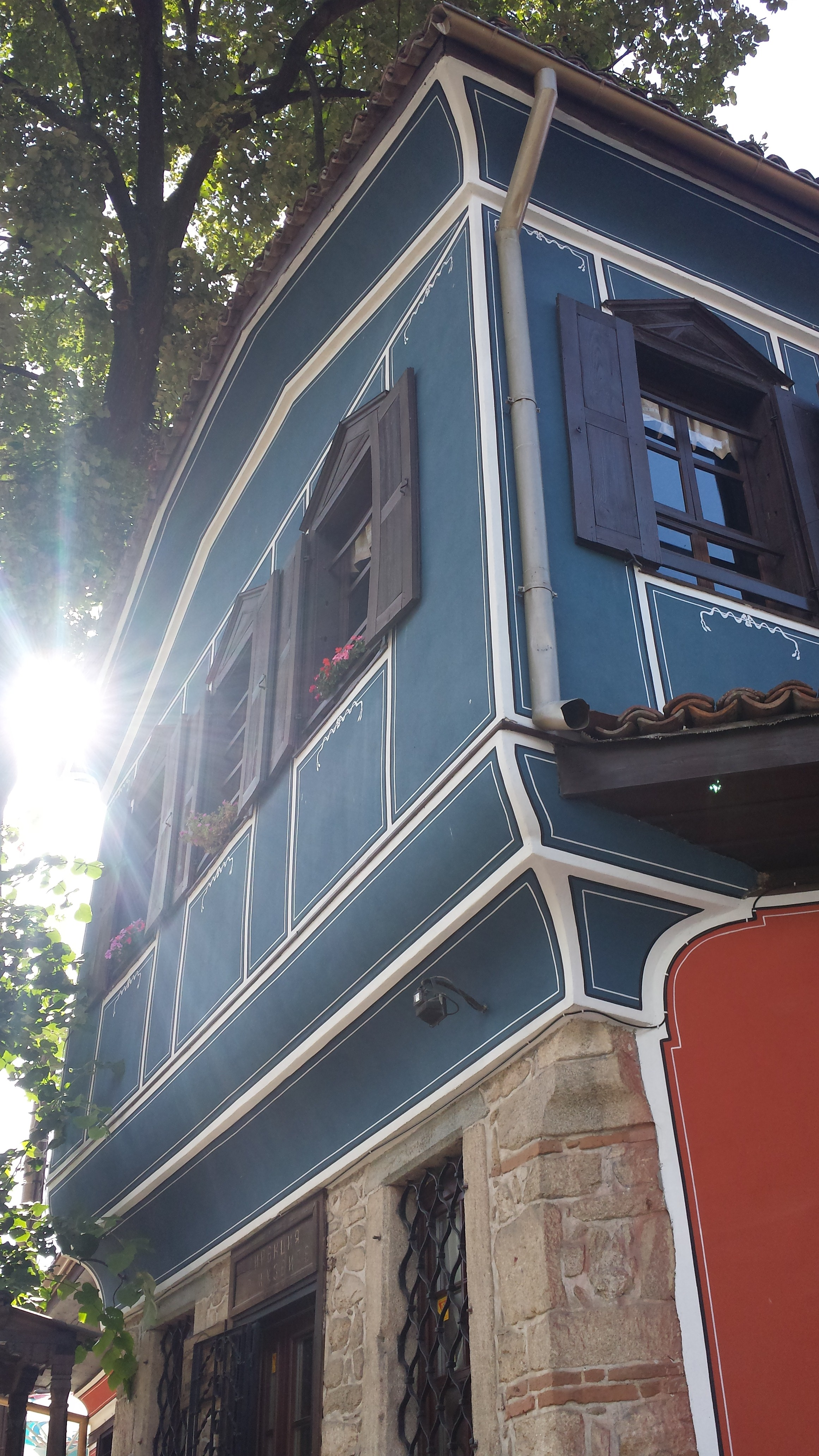 Дирекция на музеите